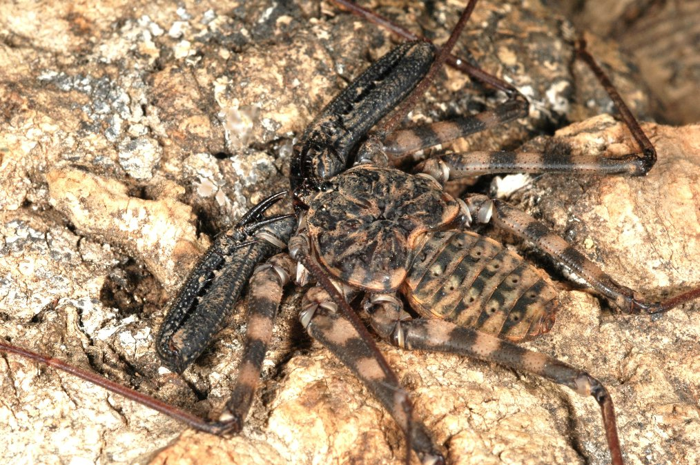 Amblypygi, Damon diadema.